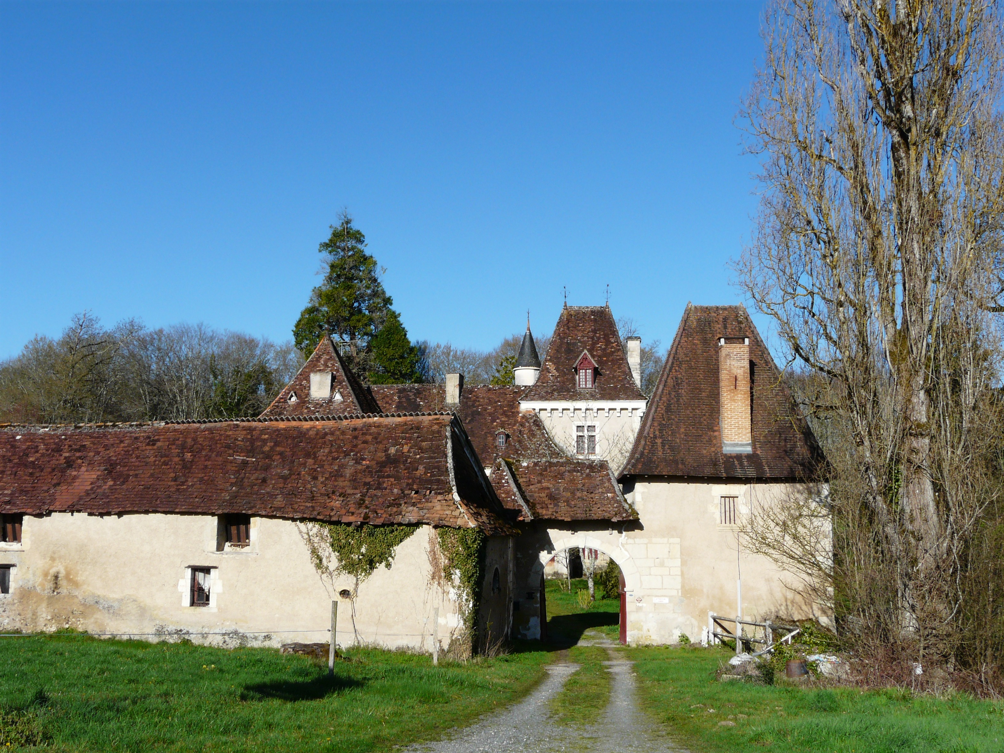 Côté est, l'entrée du château d'Eyliac, Dordogne, France.